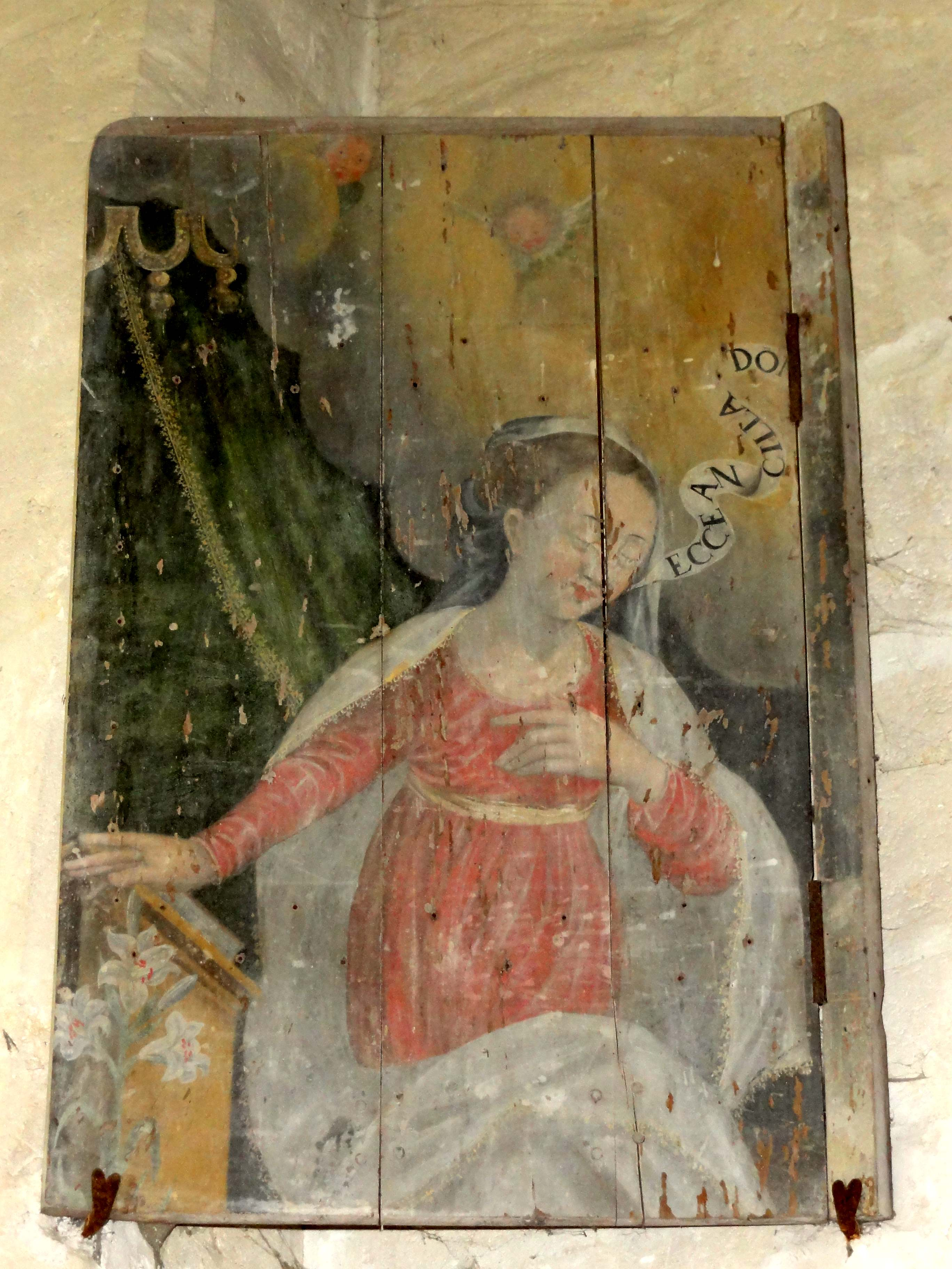 Mobilier de l'église Saint-Sulpice de Béthancourt-en-Valois - voir titre.